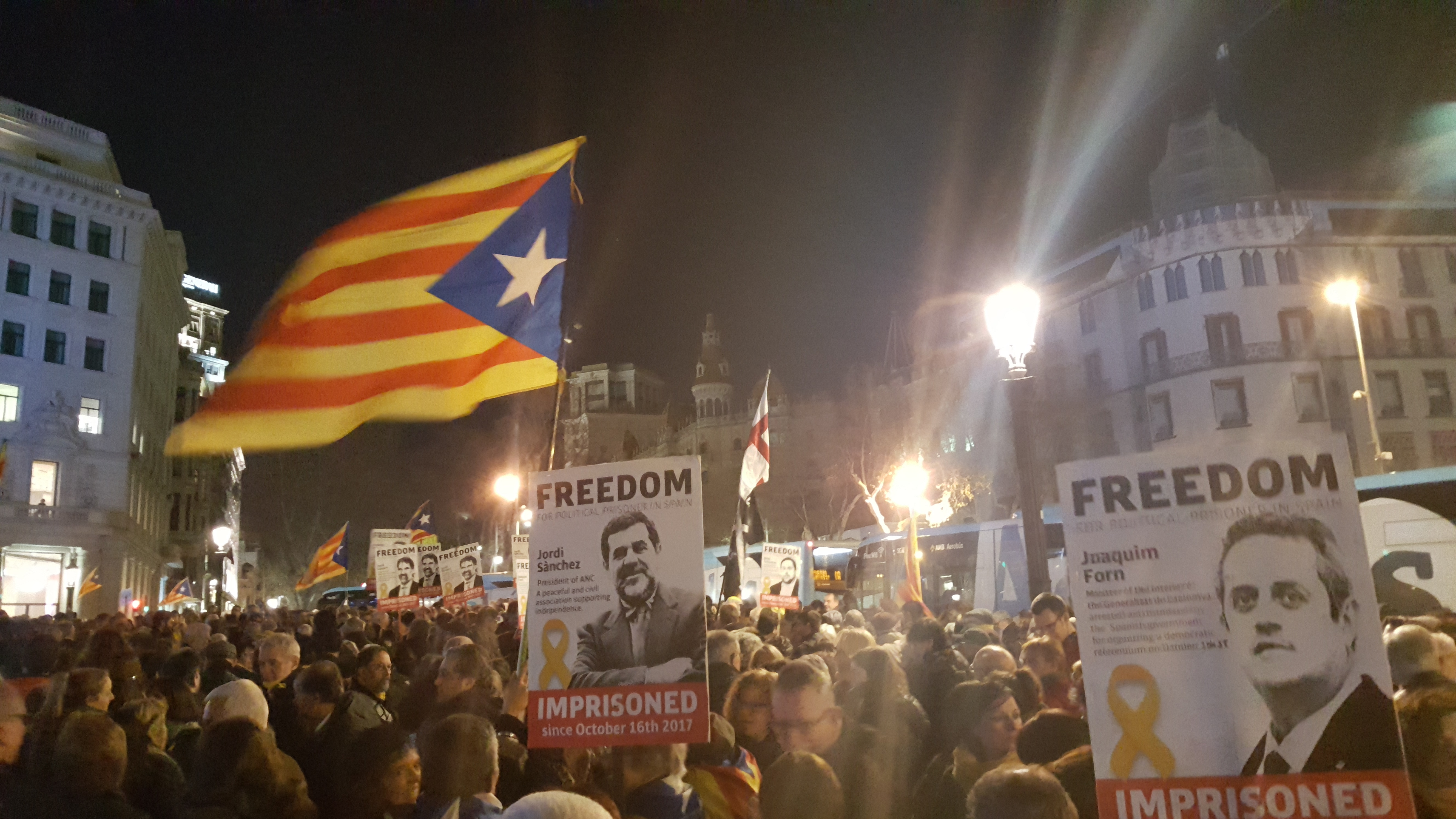 Manifestació a Barcelona